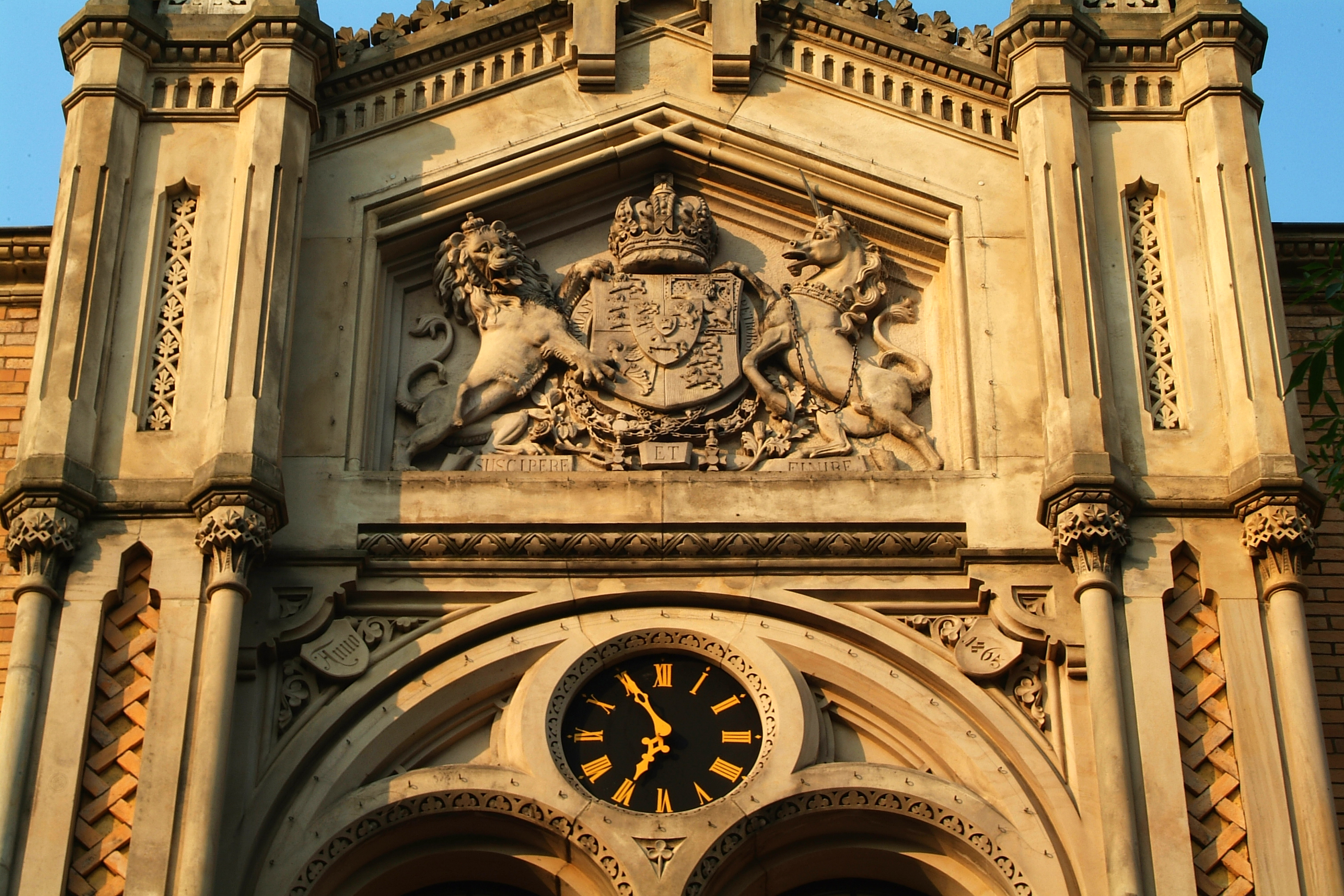 Details über dem (heutigen) Haupteingang des Marstalls beim Welfenschloss mit dem königlich-hannoverschen Wappen Löwe und Einhorn; schräg rechts darunter die Jahresangabe "1865" und - wieder mittig über dem Eingang - eine Uhr.